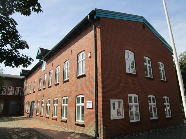 Friisk Hüs i Bredsted / Bräist